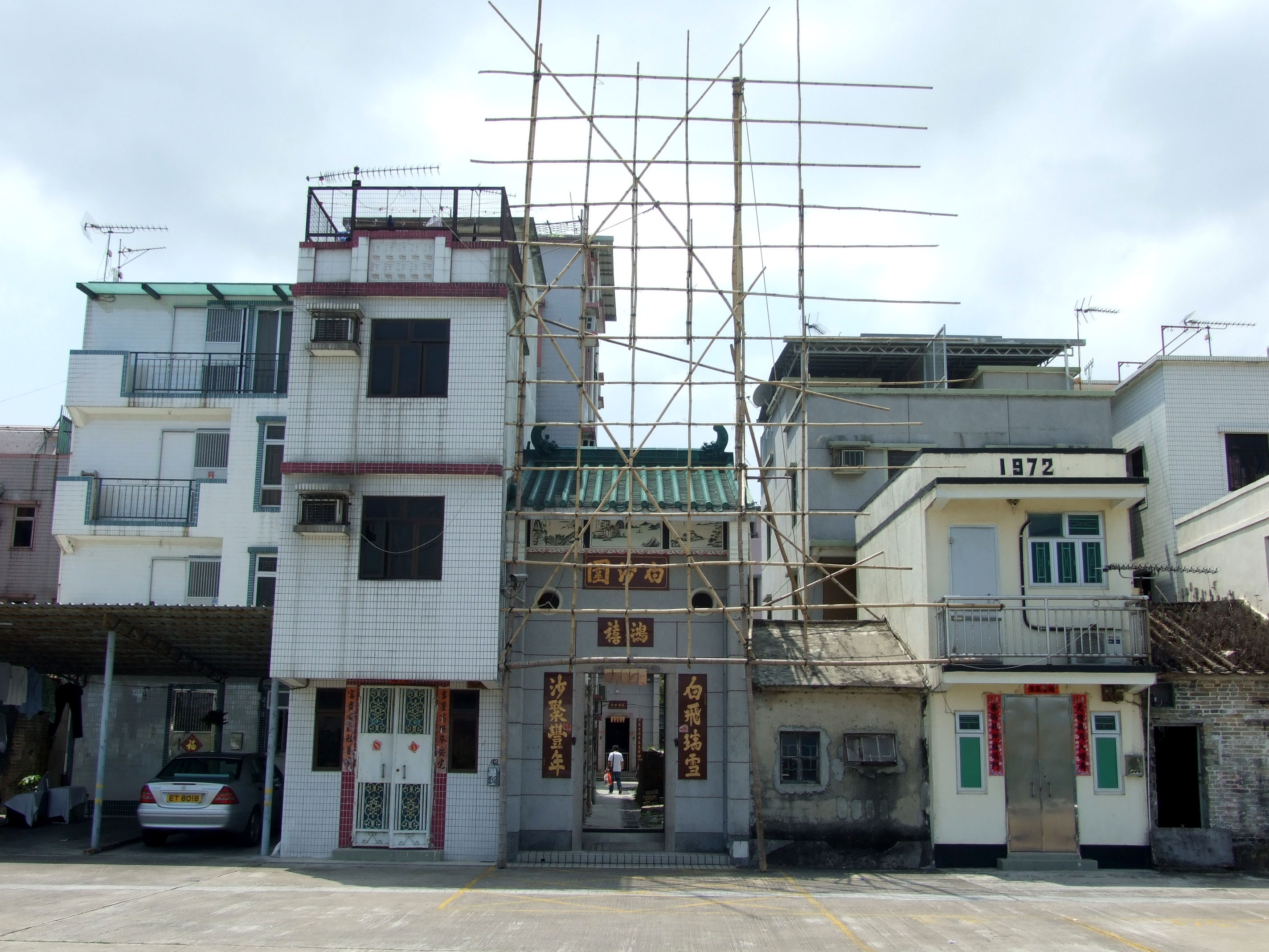 中文（香港）: 白沙村白沙圍圍門